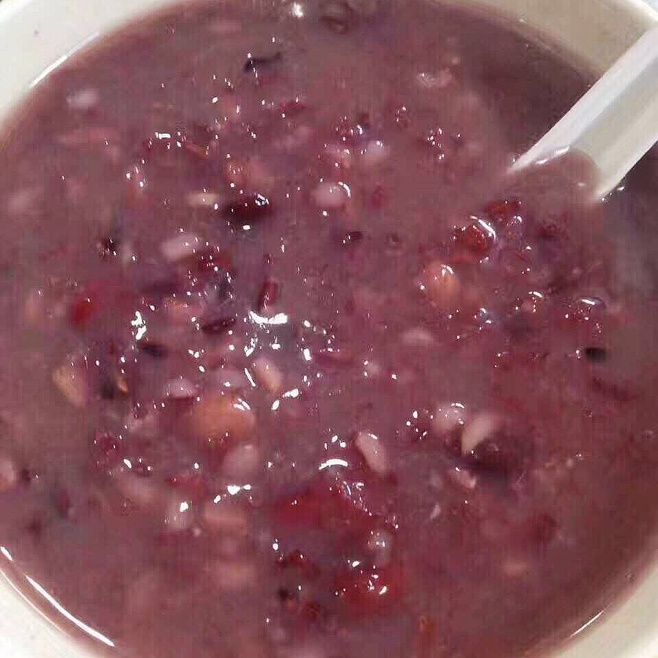 中文（中国大陆）: 传统八宝粥